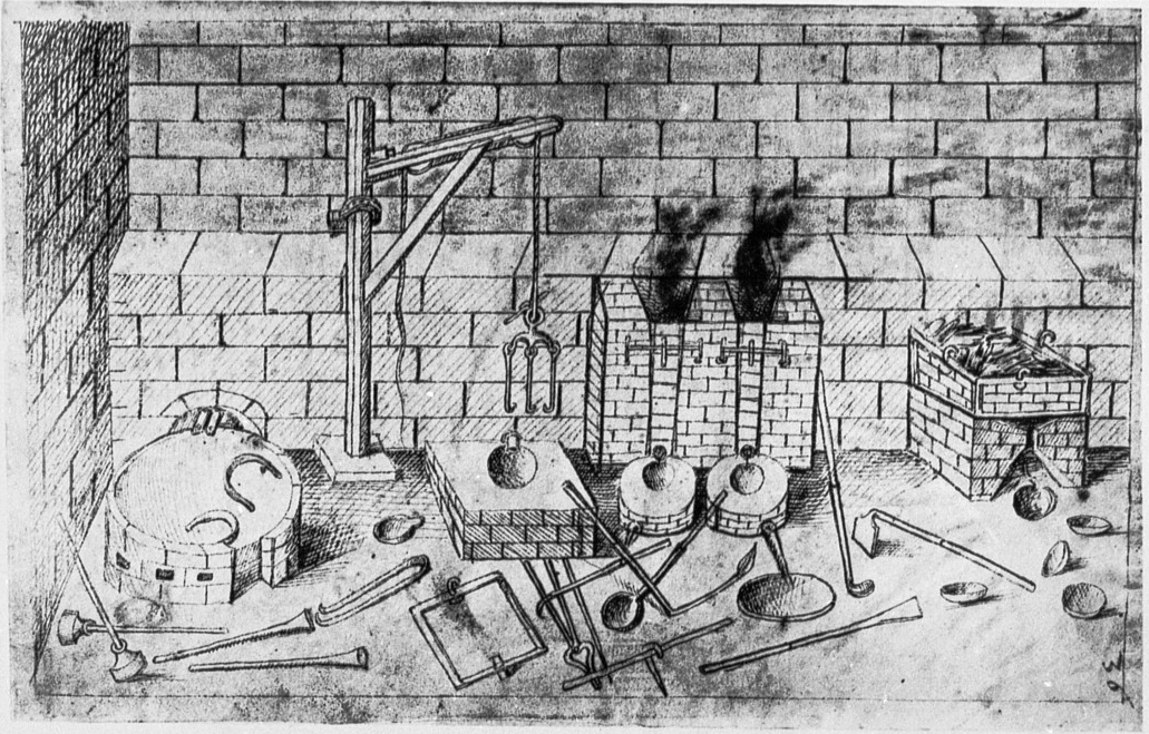 Mittelalterliches Hausbuch von Schloss Wolfegg Fol. 36r: Inneres eines Hüttenwerks, Gerätschaften für das Saigerverfahren (abgedeckter Treibofen, Schmelzöfen mit Werkzeugen)